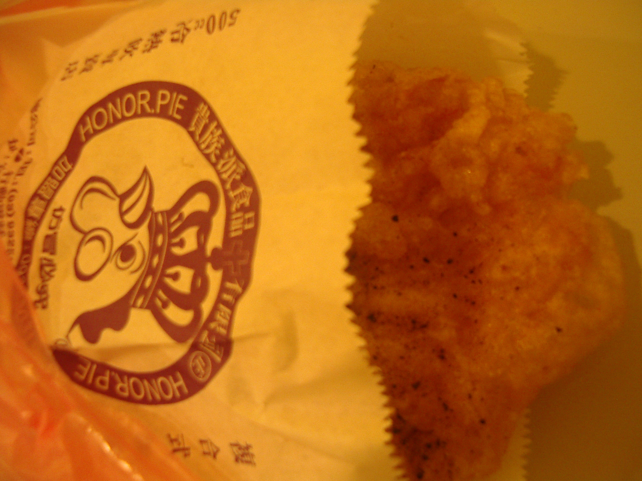 香雞排。